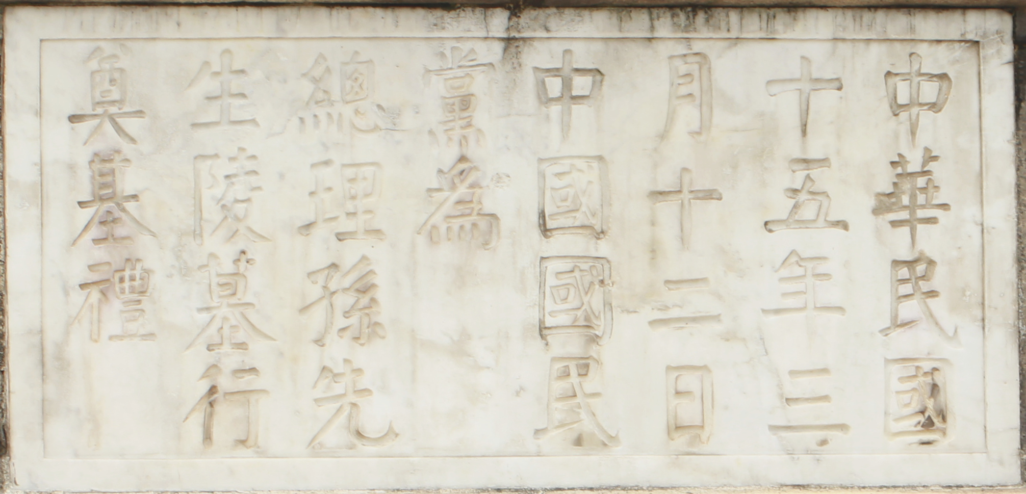 中山陵祭堂石刻。正文：“中華民國十五年三月十二日中國國民黨為總理孫先生陵墓行奠墓禮”。